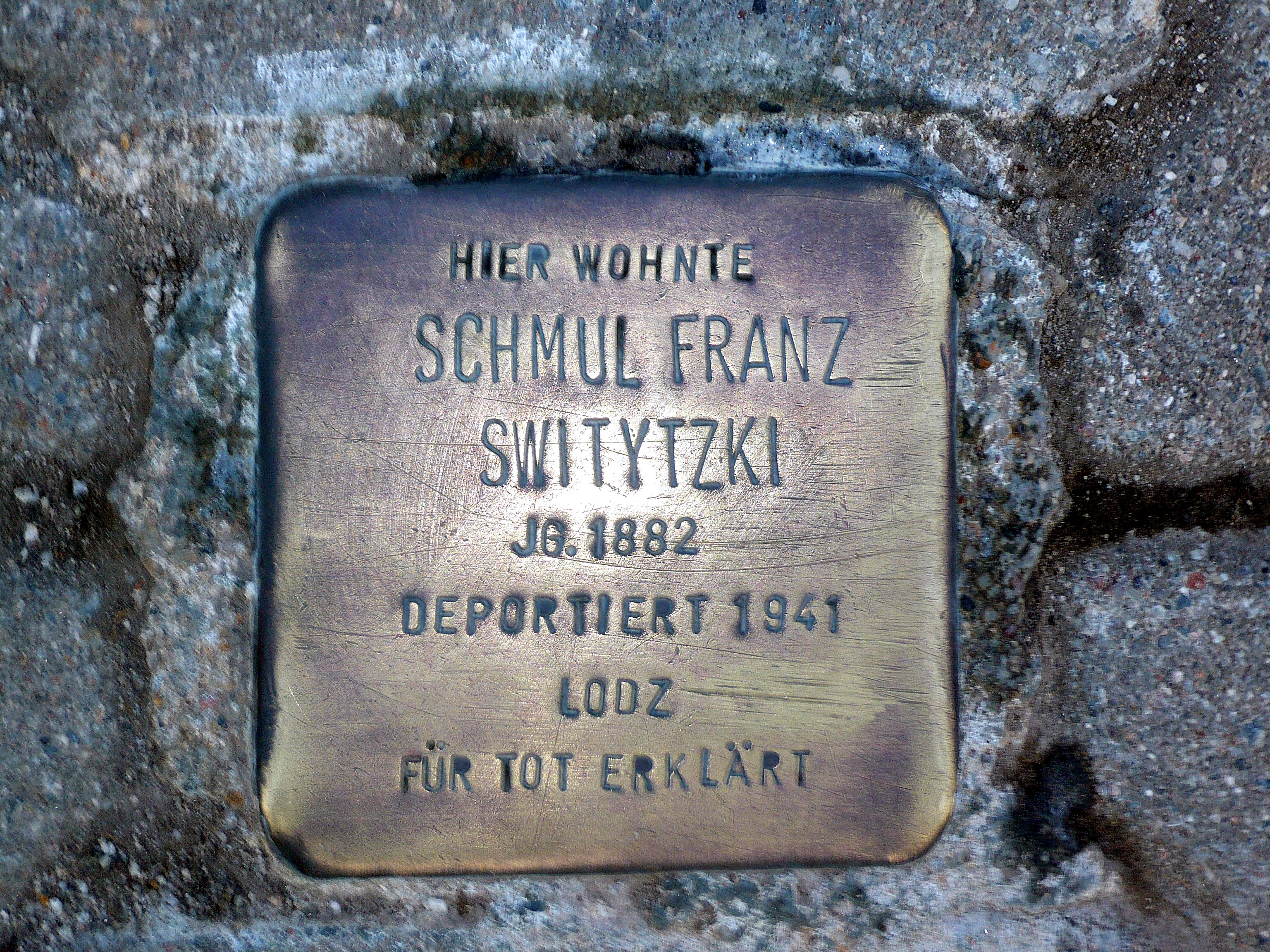 Weißenseer Weg / Hohenschönhausen